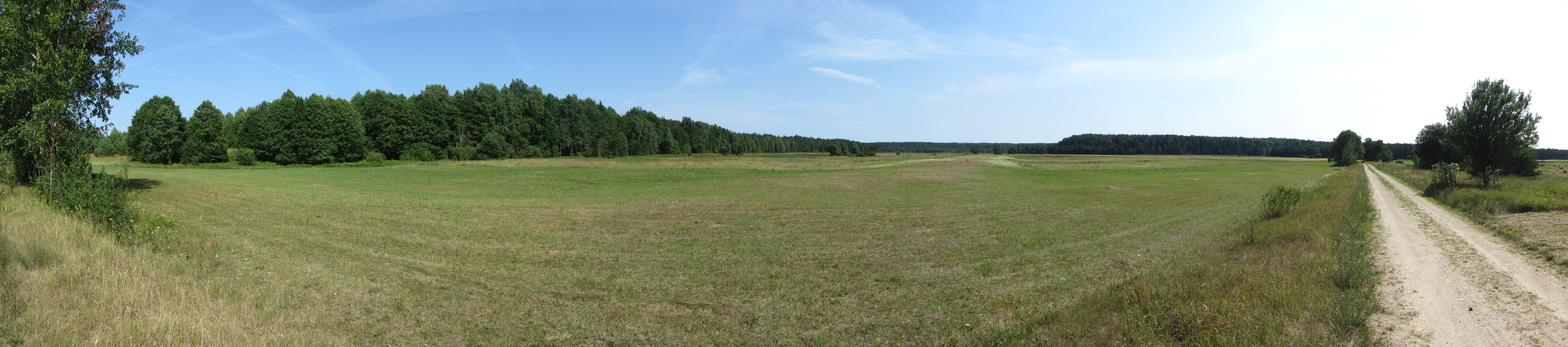 Viečiūnų sen., Lithuania